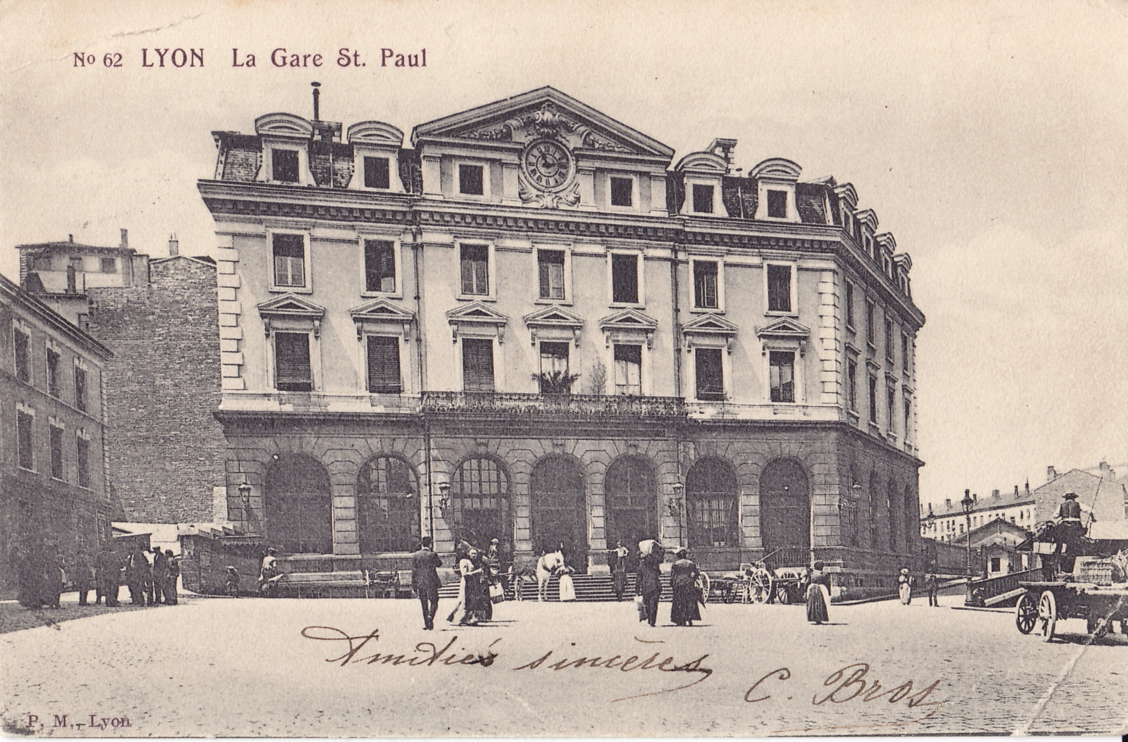 Carte postale ancienne éditée par P. M. à Lyon, n°62 : LYON - La Gare St. Paul